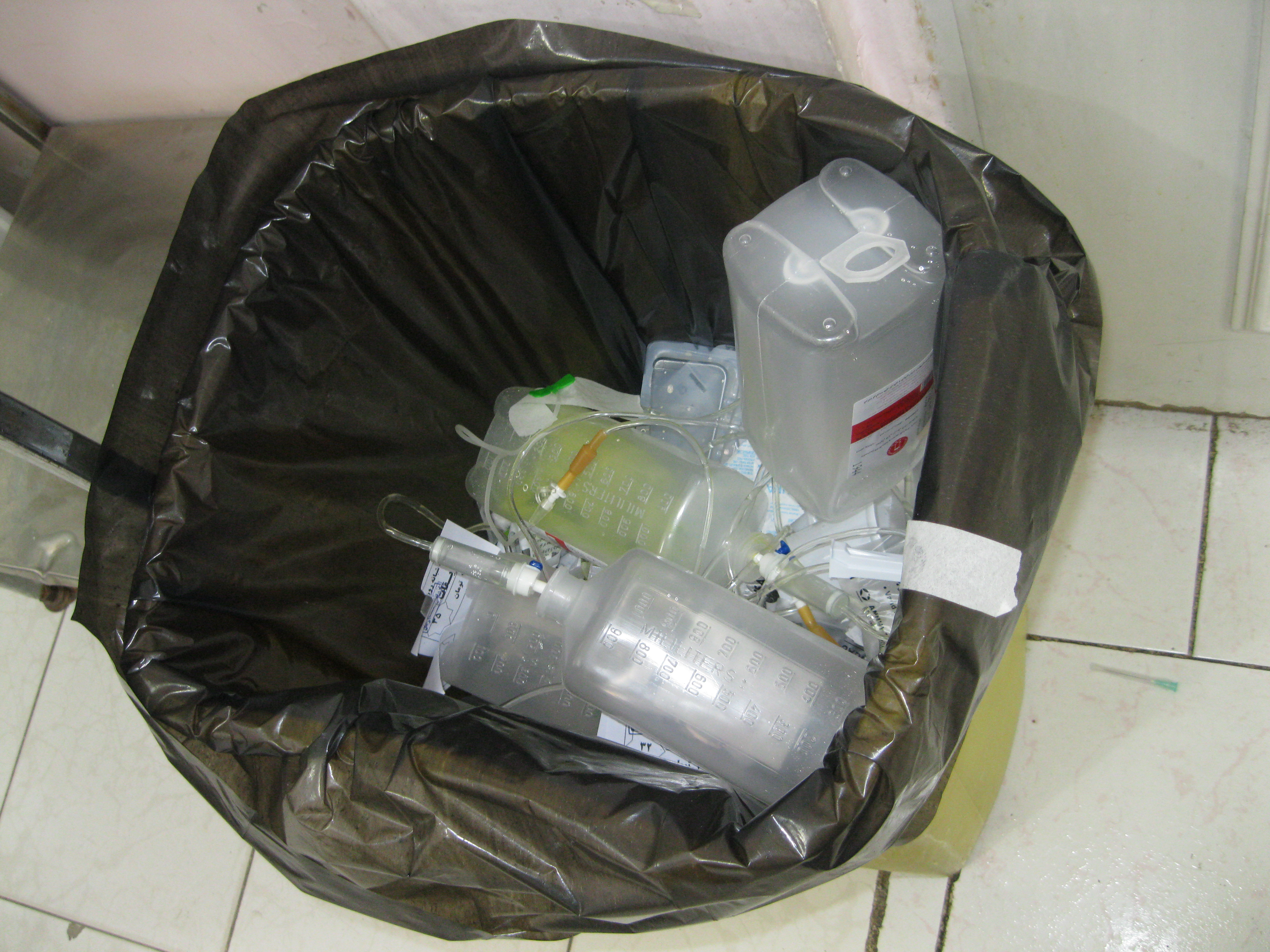 زباله های بیمارستانی